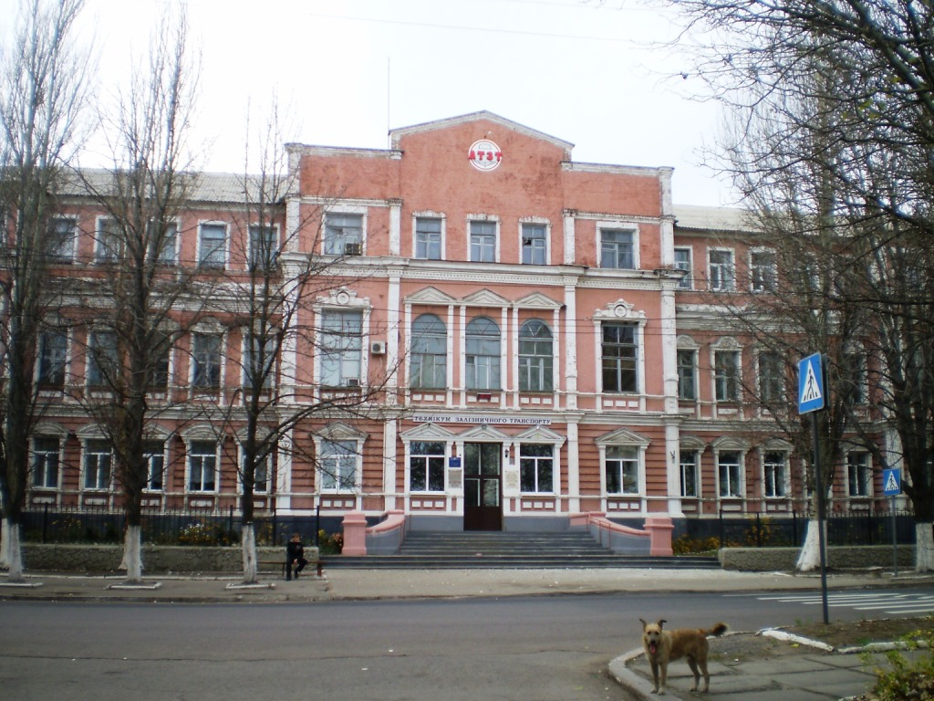 Земуправа